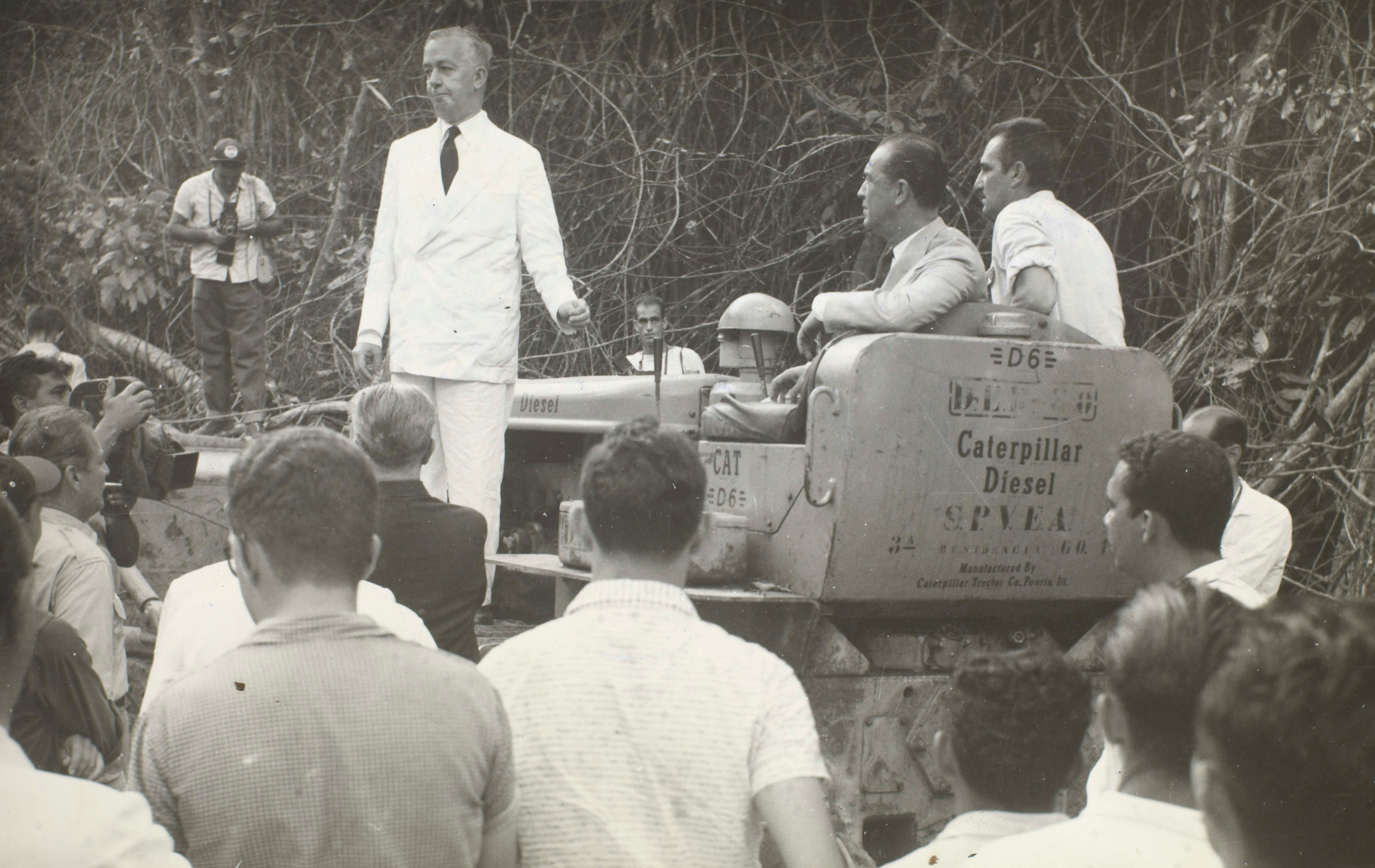 Fotografia do Fundo Correio da Manhã, sob a guarda do Arquivo Nacional.